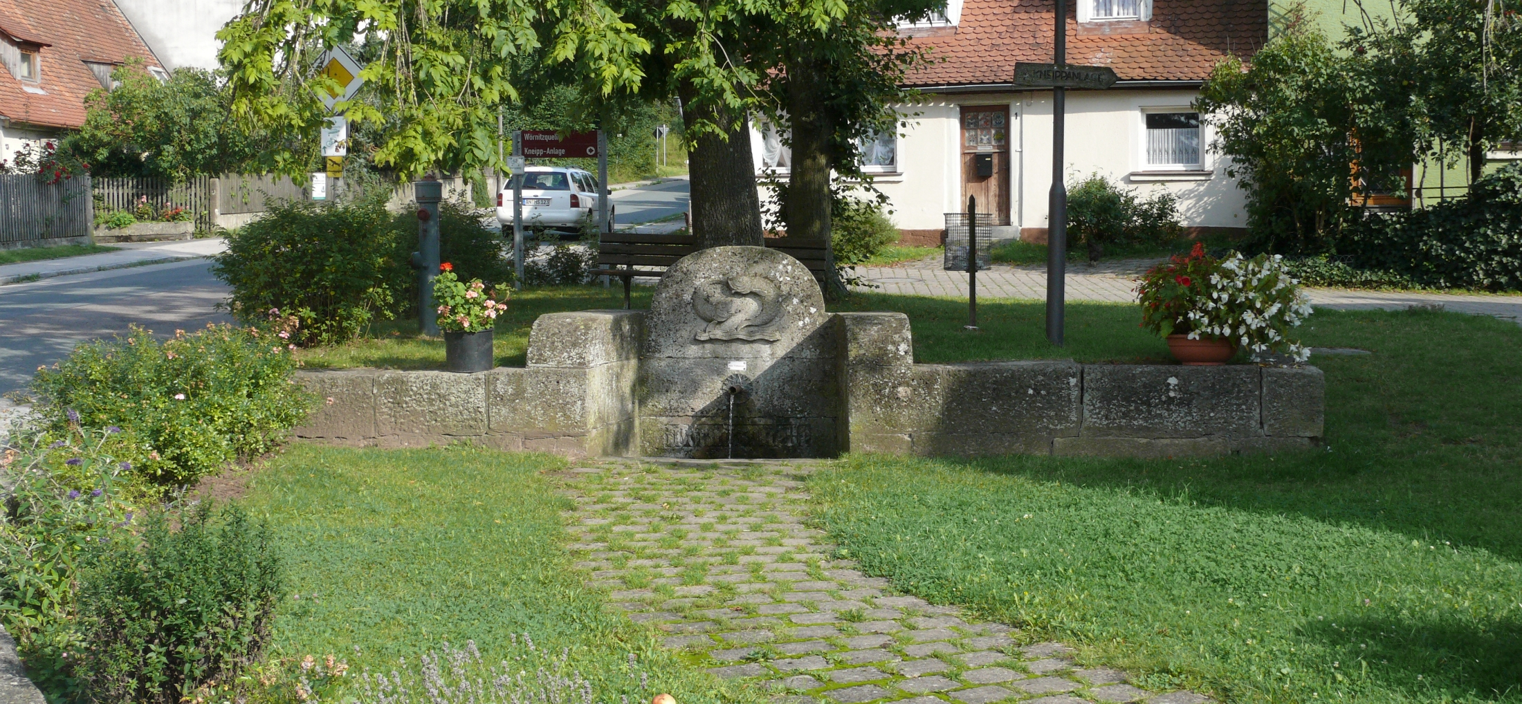 Quelle der Wörnitz spring of the Wörnitz Schillingsfürst, Germany